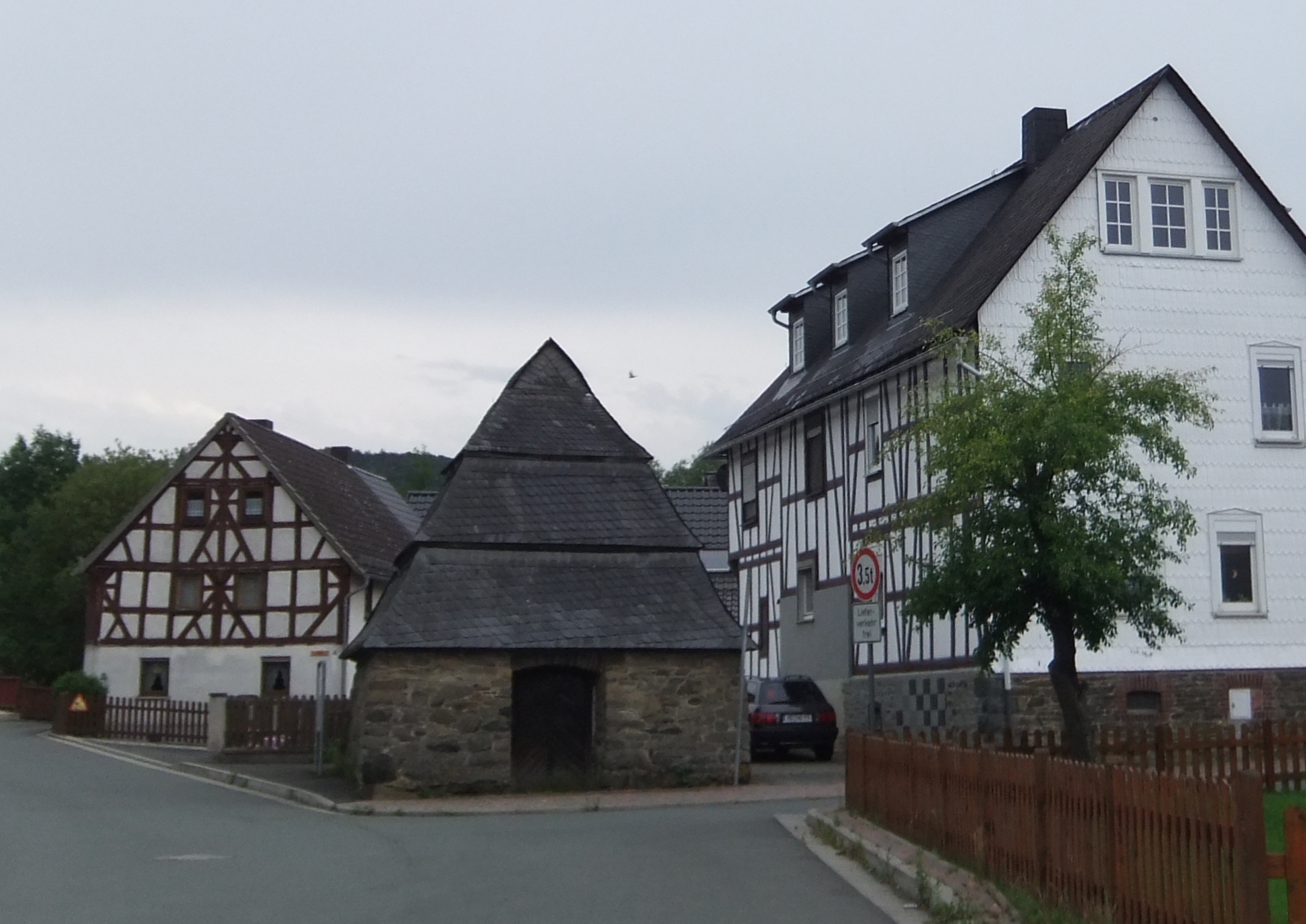 Backhaus in Steffenberg-Niedereisenhausen